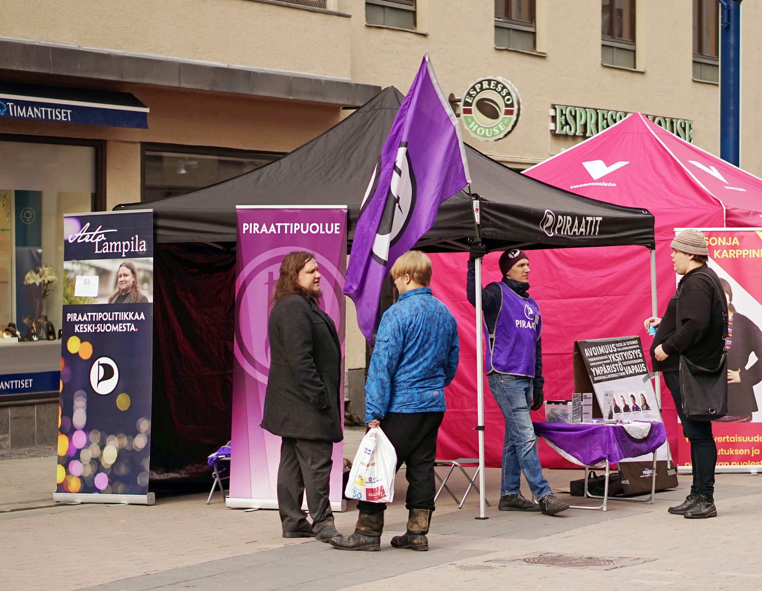 Piraattipuolue Jyväskylässä päivää ennen eduskuntavaaleja 2019.